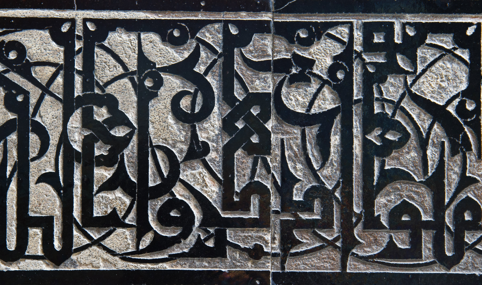 Medersa el-Attarine